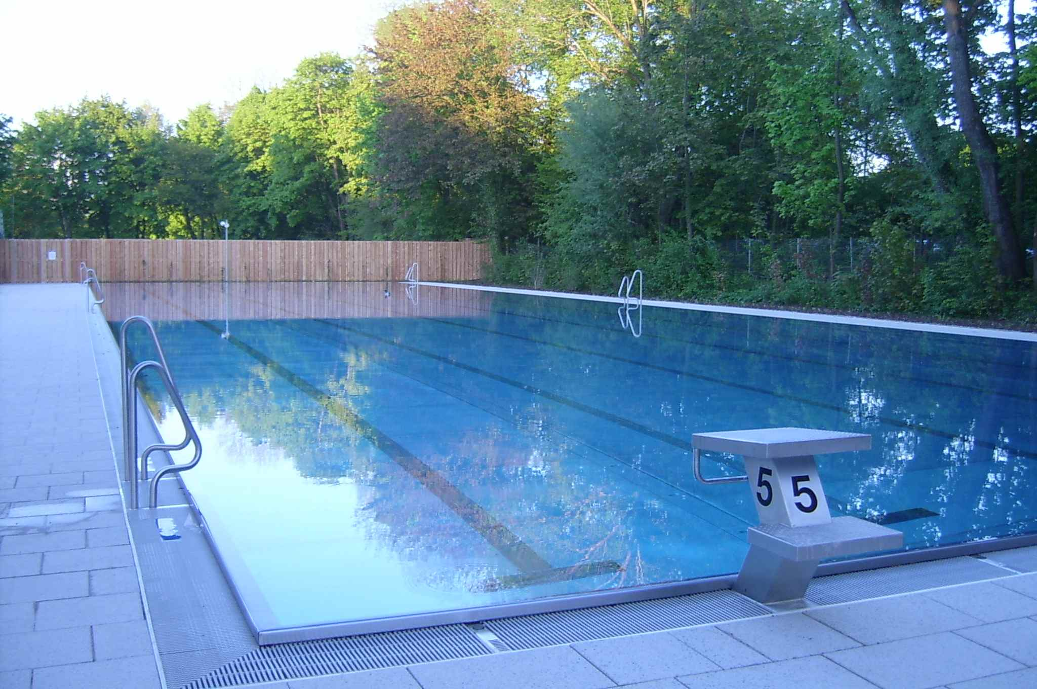 Das neu eröffnete Sommerbadebecken (50 m) im Dantebad, Mai 2008